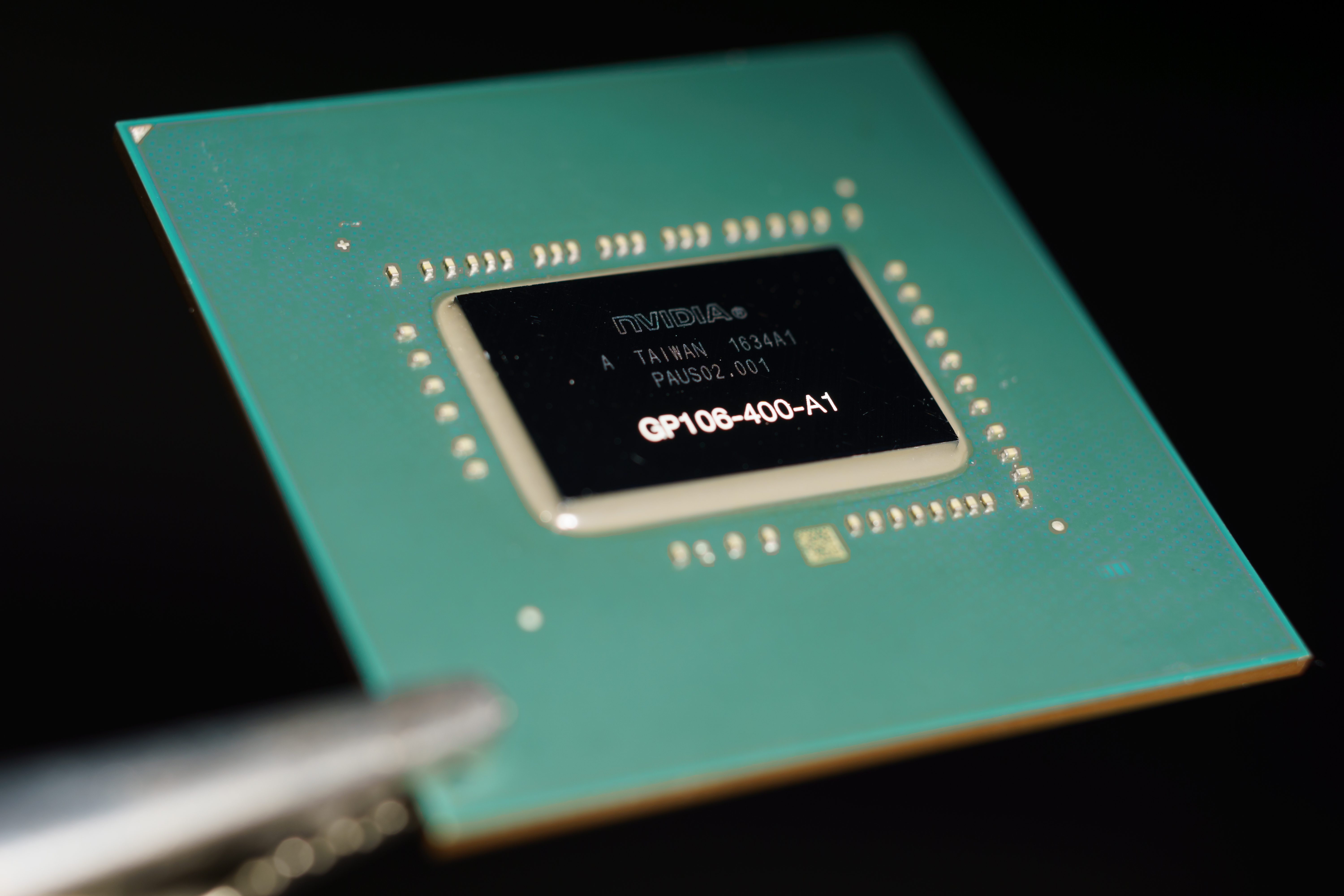 NVIDIA@16nm@Pascal@GP106@